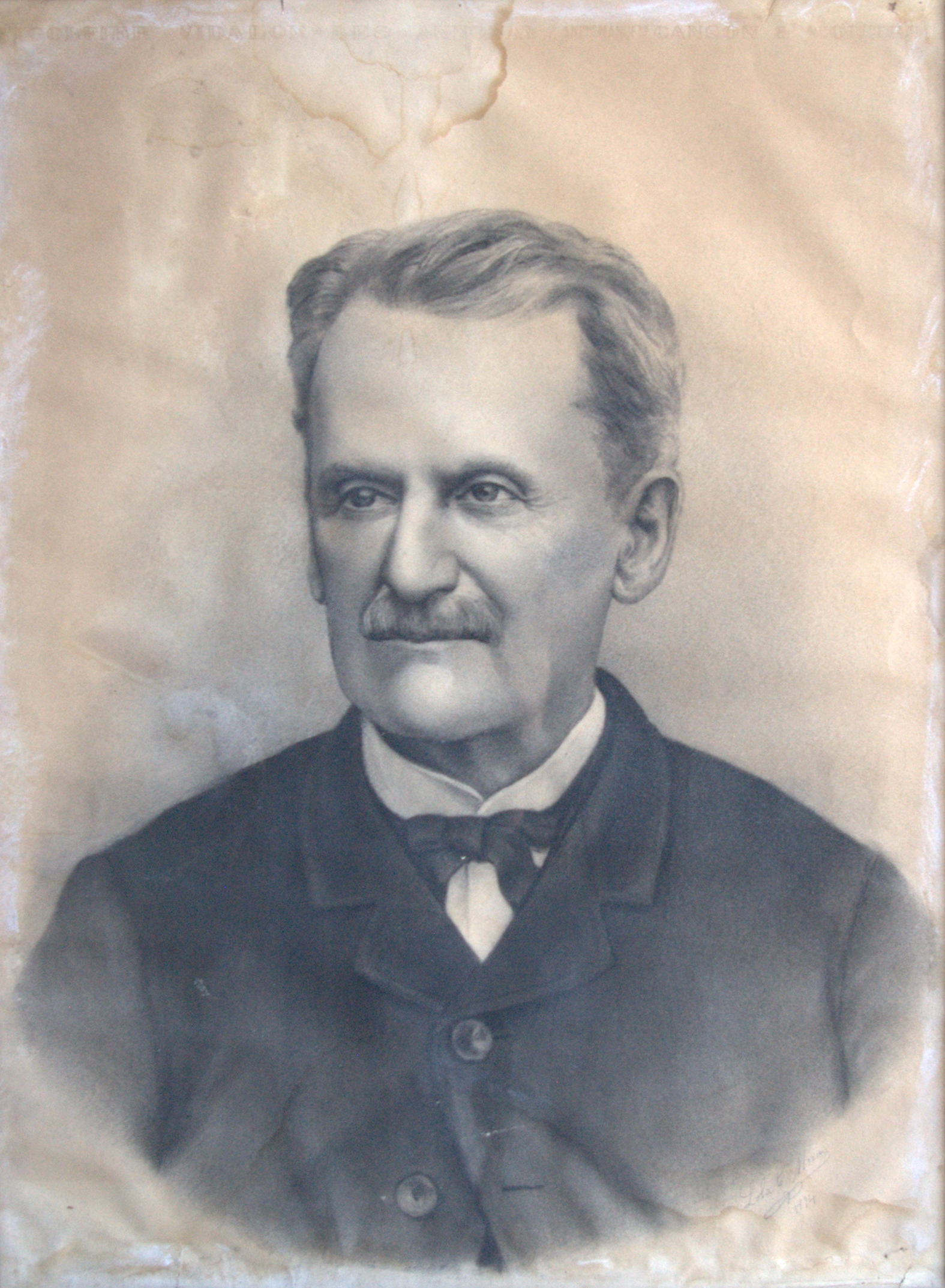 Fotografía de Benjamín Villafañe